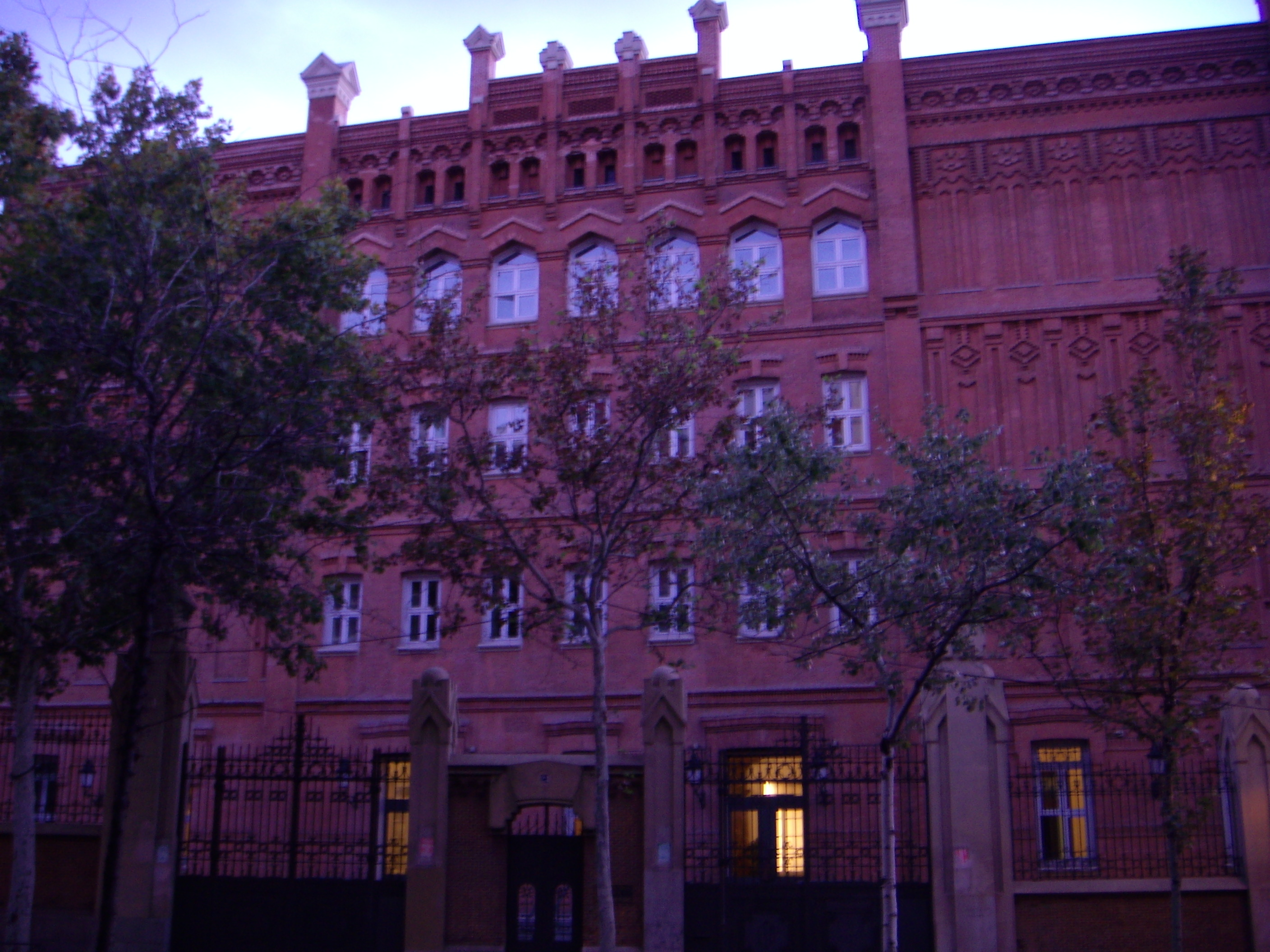 Colegio de Areneros - Currently ICAI and ICADE (Universidad Pontificia Comillas) by Enrique Fort y Antonio Palacios (1903-10). Arte Neomudéjar Ref: Desarrollo Urbano y Estilos Arquitectónicos por Joaquín Bosque Maurel. Boletín de la Real Sociedad Geográfica, 2001-2002.